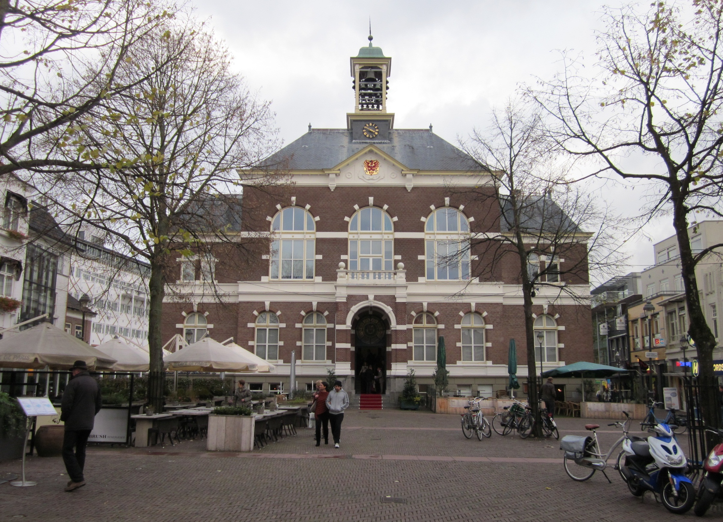 Raadhuis in Apeldoorn, Nederland